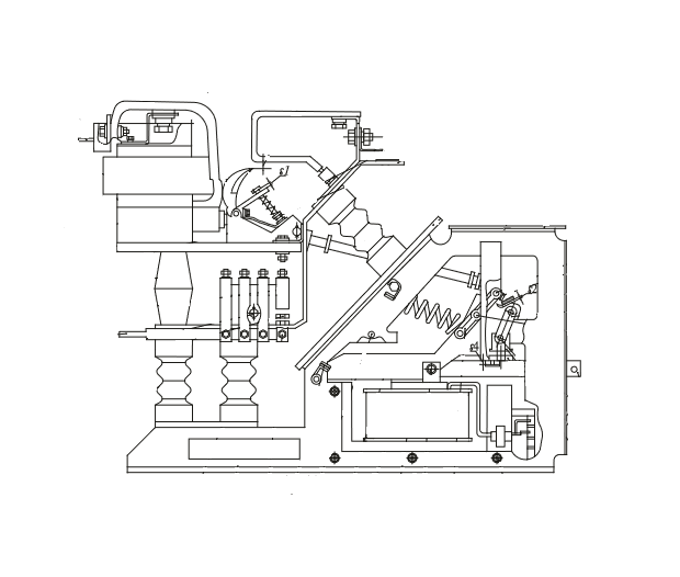 Быстродействующий выключатель ВАБ-49